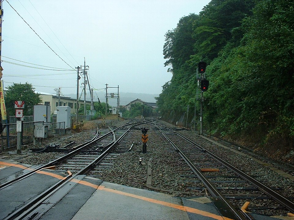 塩町駅東方 芸備線（左奥）と福塩線（右奥）の分岐 2003年8月17日 Bakkai撮影